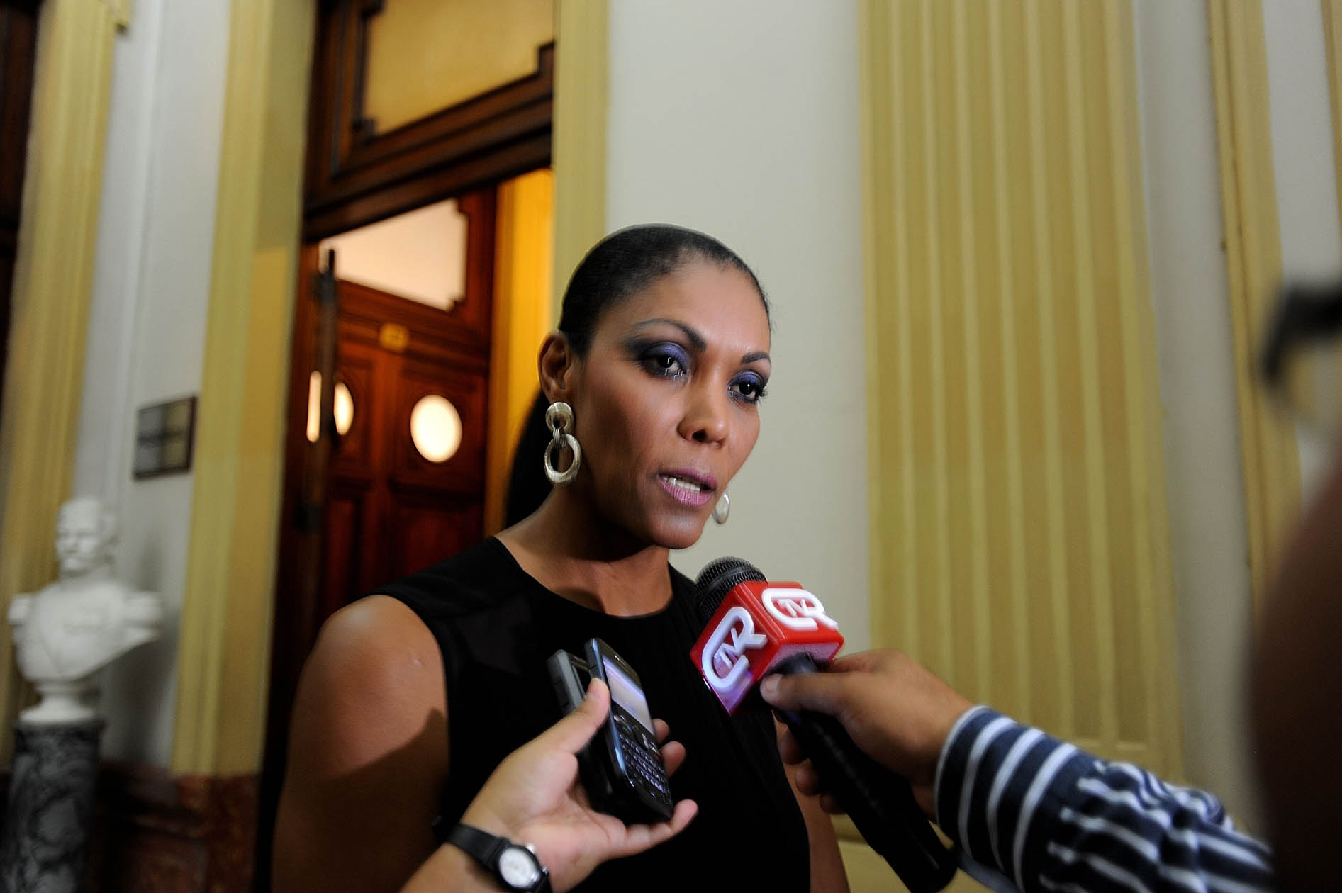 La legisladora Cenaida Uribe Medina formula declaraciones al periodismo sobre diversos temas de la actualidad política nacional, en el Palacio Legislativo.